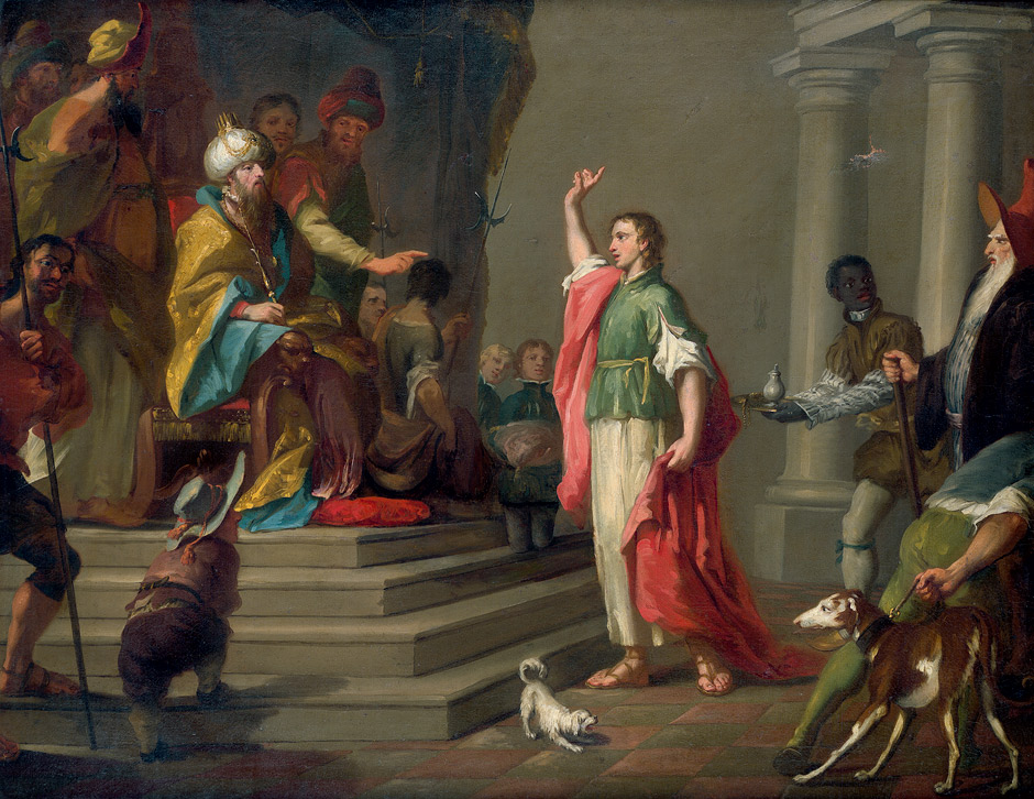 Joseph deutet die Träume des Pharao. Venetianische Schule, 18. Jh. Öl auf Leinwand, doubliert. 94,5 x 122 cm.